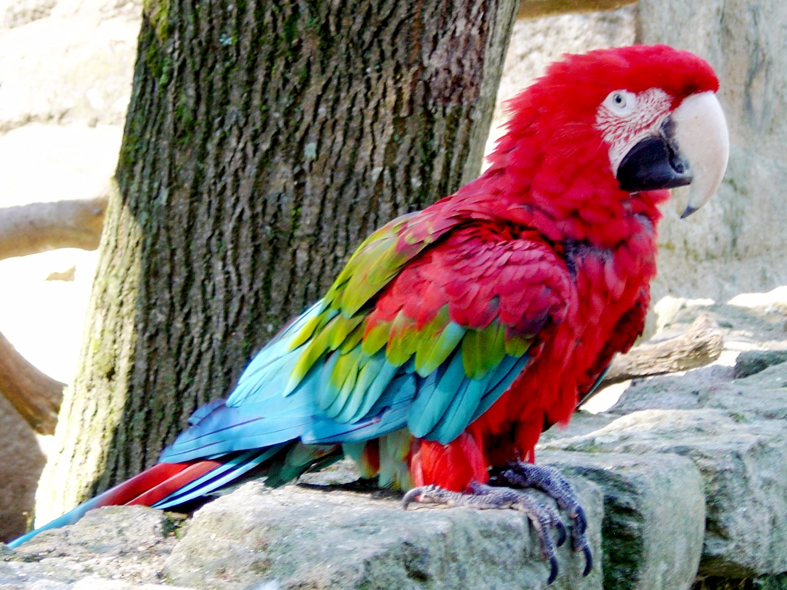 Ara chloropterus, Puerto Ayacucho, Venezuela.